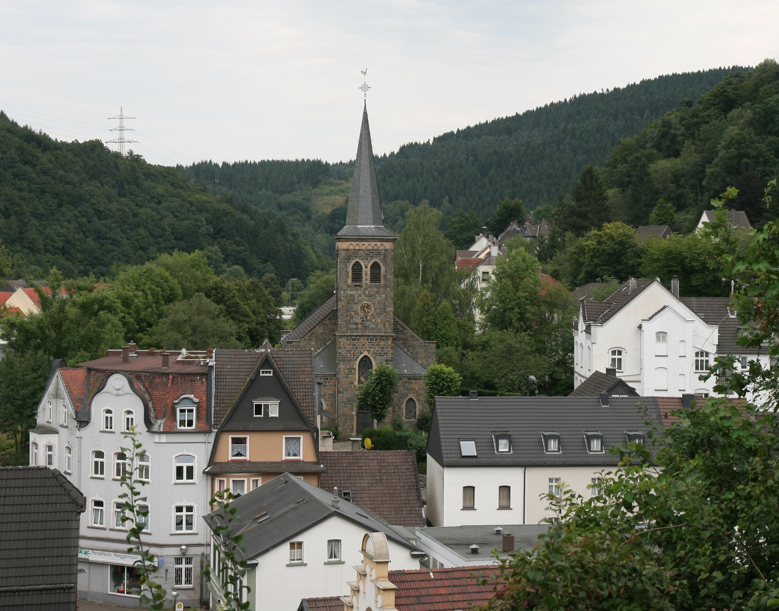 Evangelische Erlöserkirche in Schalksmühle. Erbaut 1892, Kirchturm 1896, neugotischer Saalbau, denkmalgeschützt.